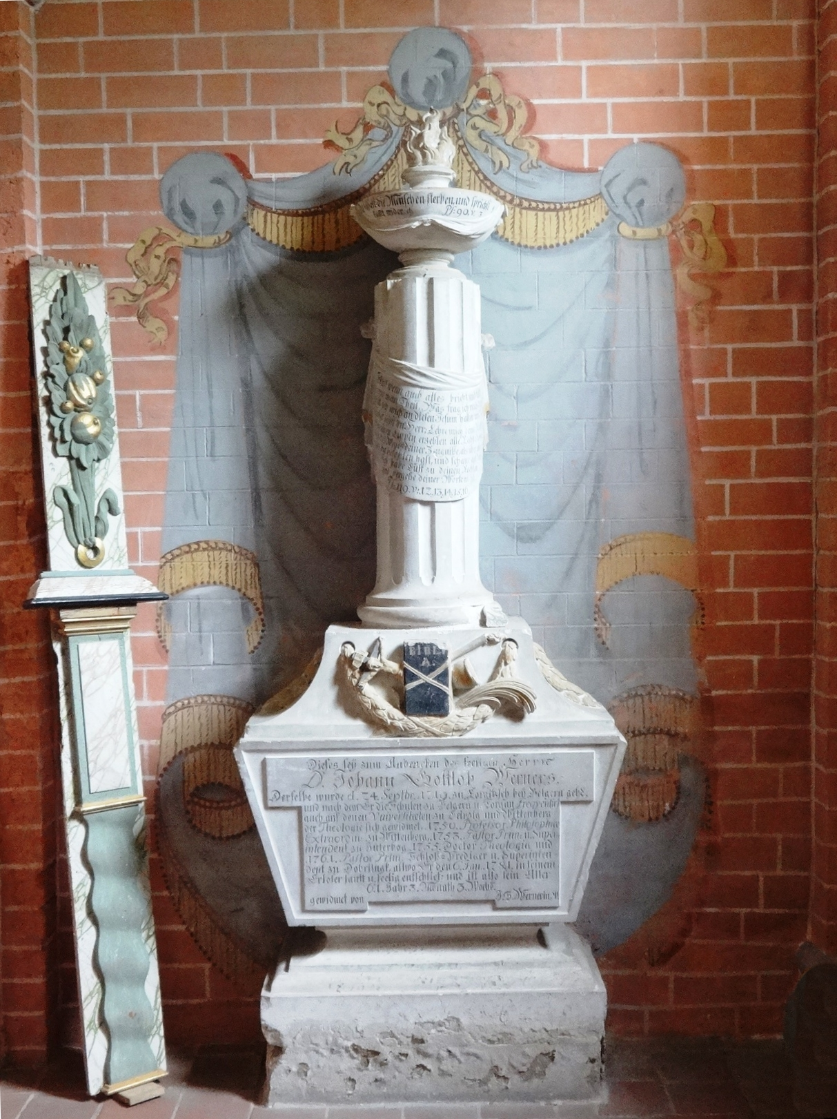 Die Klosterkirche in Doberlug gilt als das älteste erhaltene Gotteshaus der Zisterzienser im Osten Deutschlands. Sie wurde zwischen 1184 und 1228 erbaut und nach der Reformation zu einer Schlosskirche umgebaut. Mitte des 19. Jahrhunderts wurde das Mobiliar wieder entfernt und unter der Leitung des Architekten Carl Weber in den Jahren 1905 bis 1909 umgebaut.